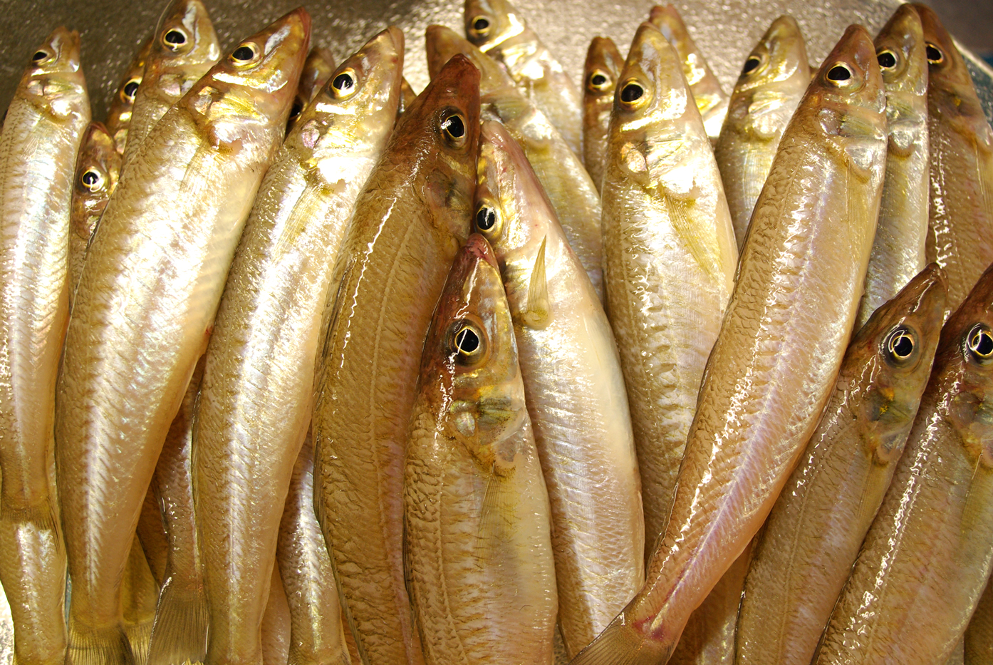 Japanese sillago!